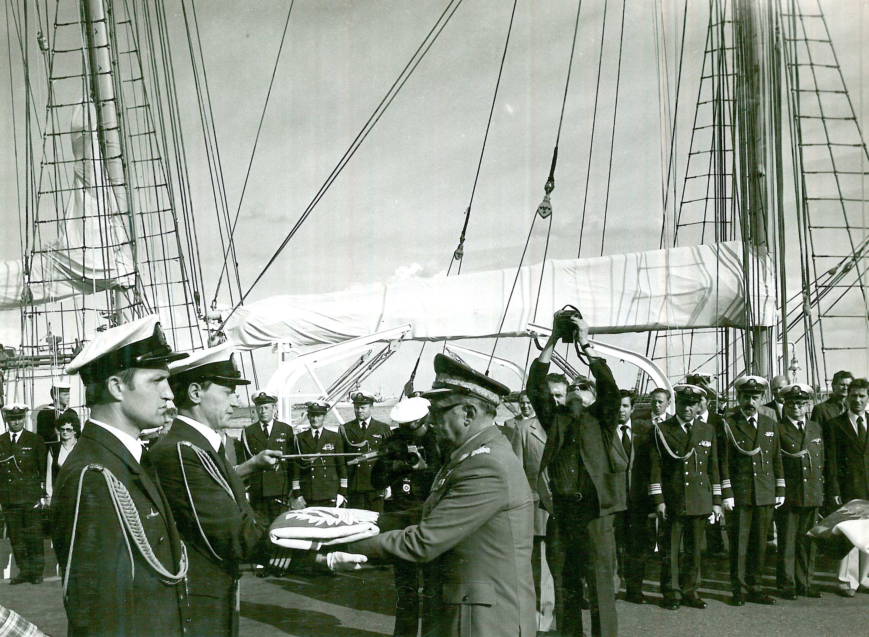 11 sierpnia 1982r. -Generał broni Florian Siwicki wręcza banderę wojenną dla dowódcy okrętu kpt. mar. Lecha Soroki.